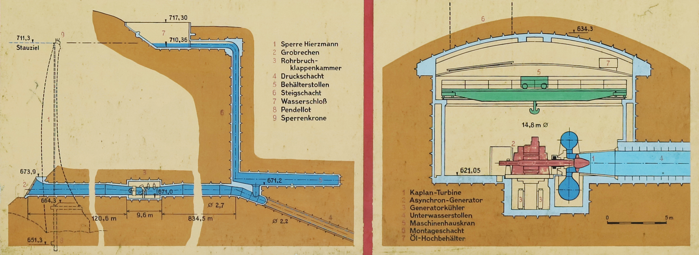 Schnitt durch den Kraftabstieg und die Kaverne des Speicherkraftwerks St. Martin am Wöllmißberg